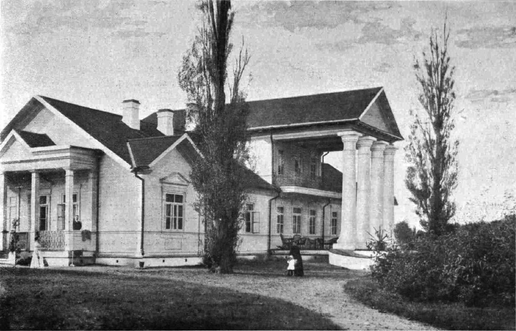 Беларуская (тарашкевіца): Біжаравічы (Bižaravičy), сядзіба Ордаў (Orda)